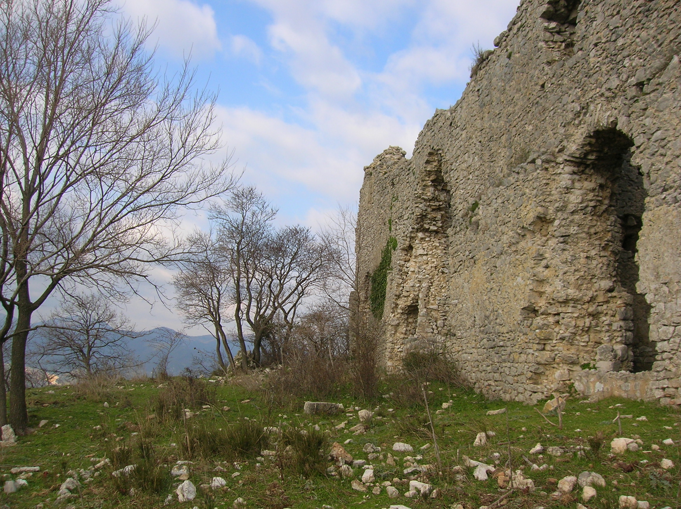 Ruderi di S Martino esterno (Fara in Sabina)